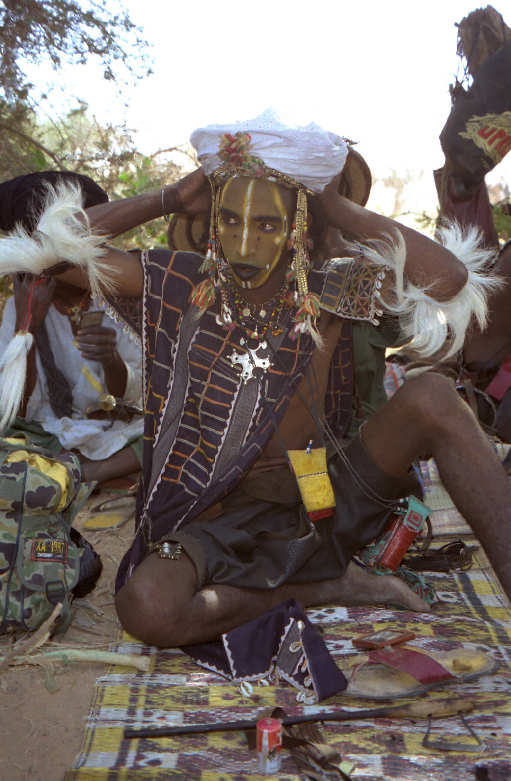 A Wodaabe man preparing for a Yaake demonstration. Niger, 1997.1997 #276-10A Yaake backstage